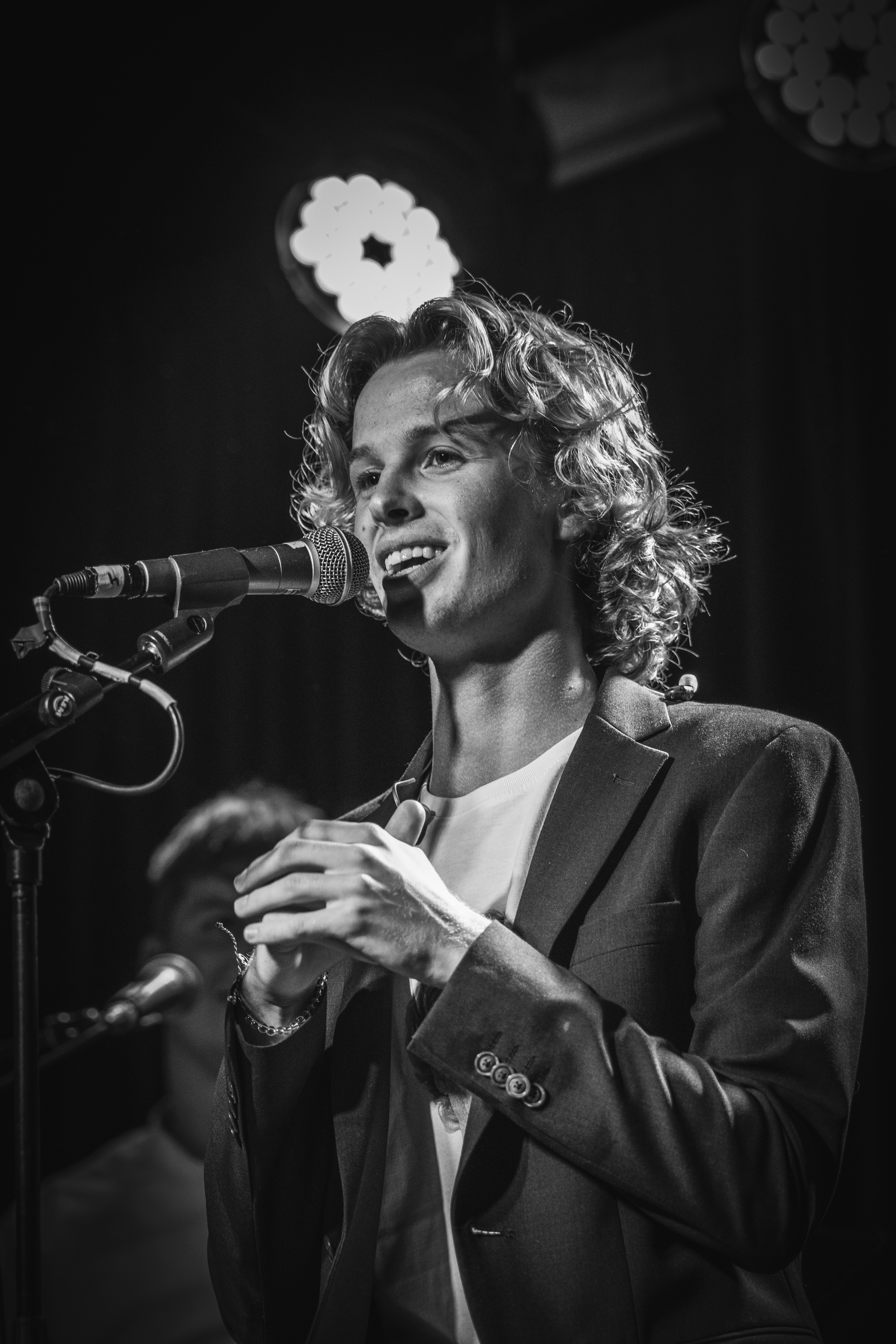 Isak Danielson, från spelningen på Pustervik i Göteborg - augusti 2018.